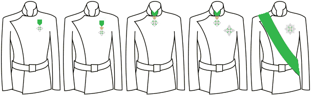 Modo di indossare le decorazioni dell'Ordine dei Santi Maurizio e Lazzaro (Regno d'Italia)